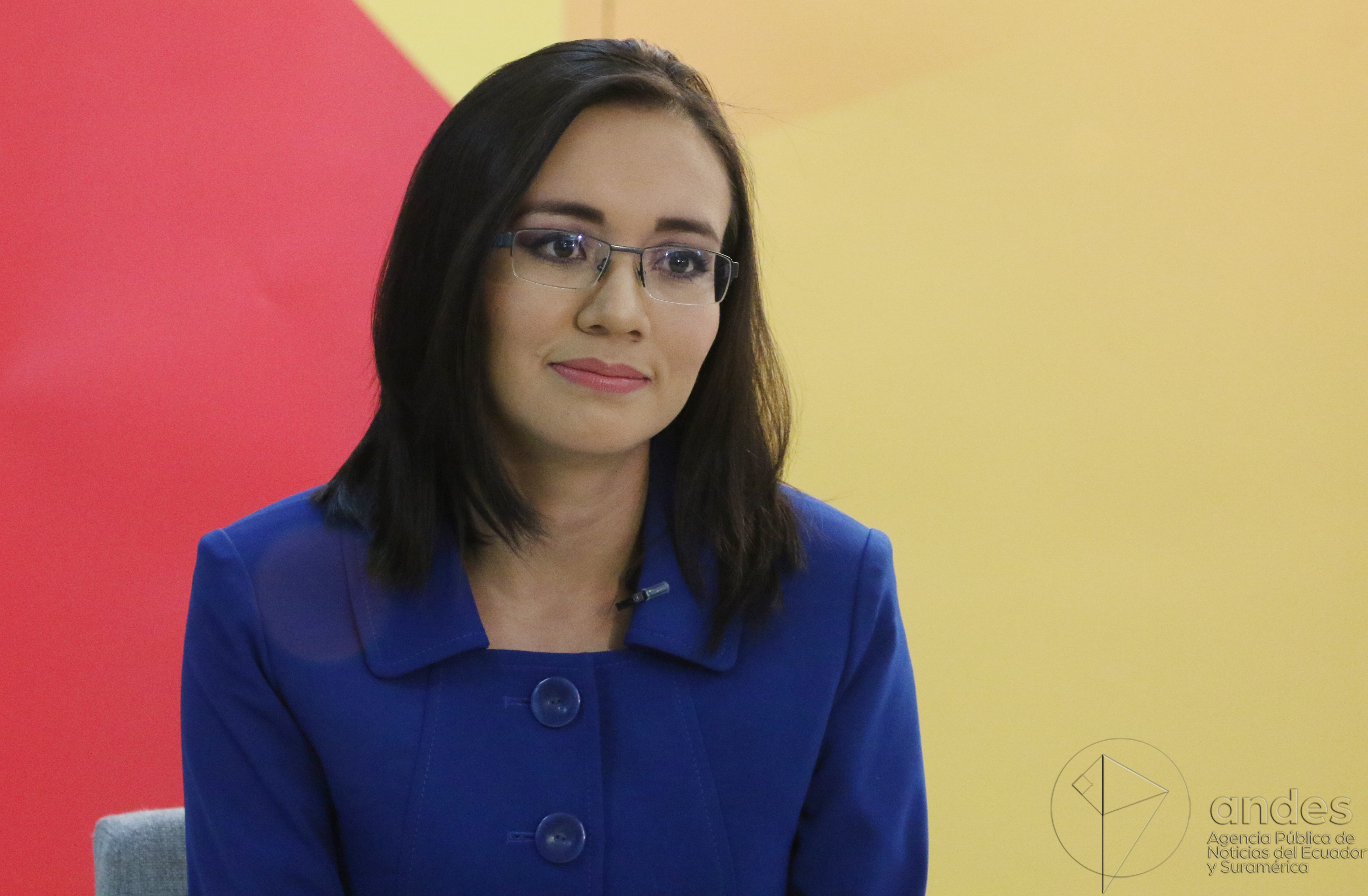 Sandra Naranjo en 2017. Secretaria Nacional de Planificación y Desarrollo de Ecuador durante el gobierno de Rafael Correa.